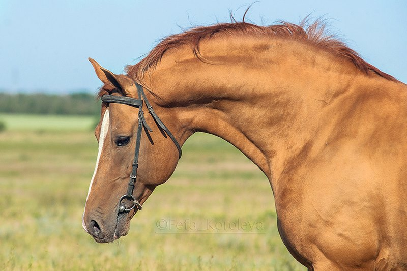 Донской жеребец Бруч (Бизон - Челеста) Производитель в к/з им. Будённого